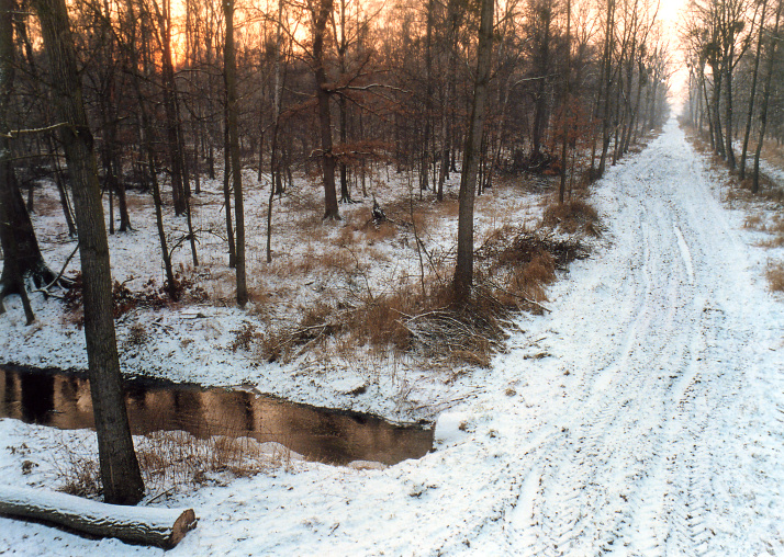 Forstwirtschaftsweg im Großen Giebelmoor 1986, Landkreis Gifhorn, Niedersachsen